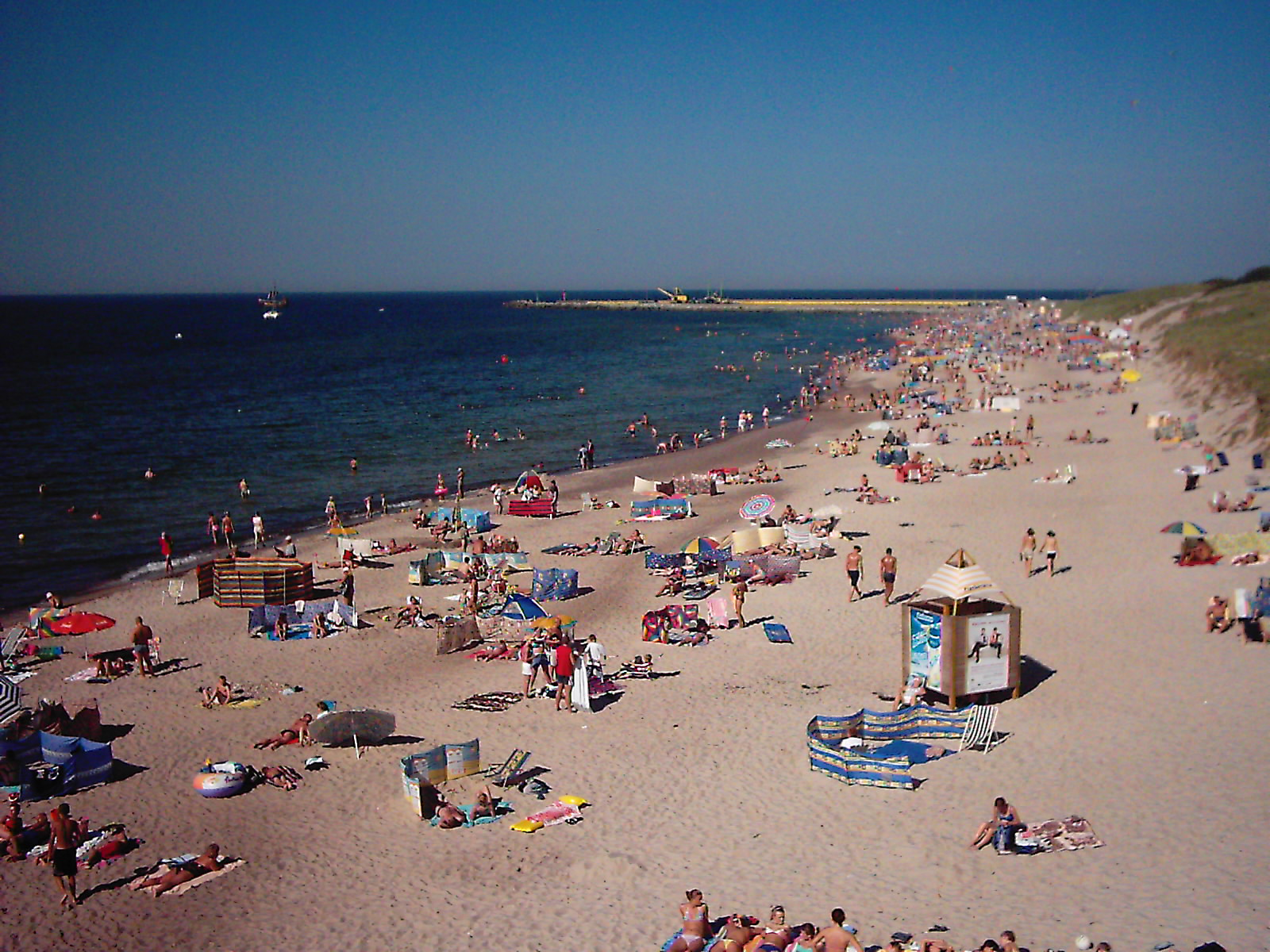 Plaża w Darłówku. Data: sierpień 2005. Autor: Kac_zoR Beach in Darlowko, Poland. Date: august 2005. Author: Kac_zoR